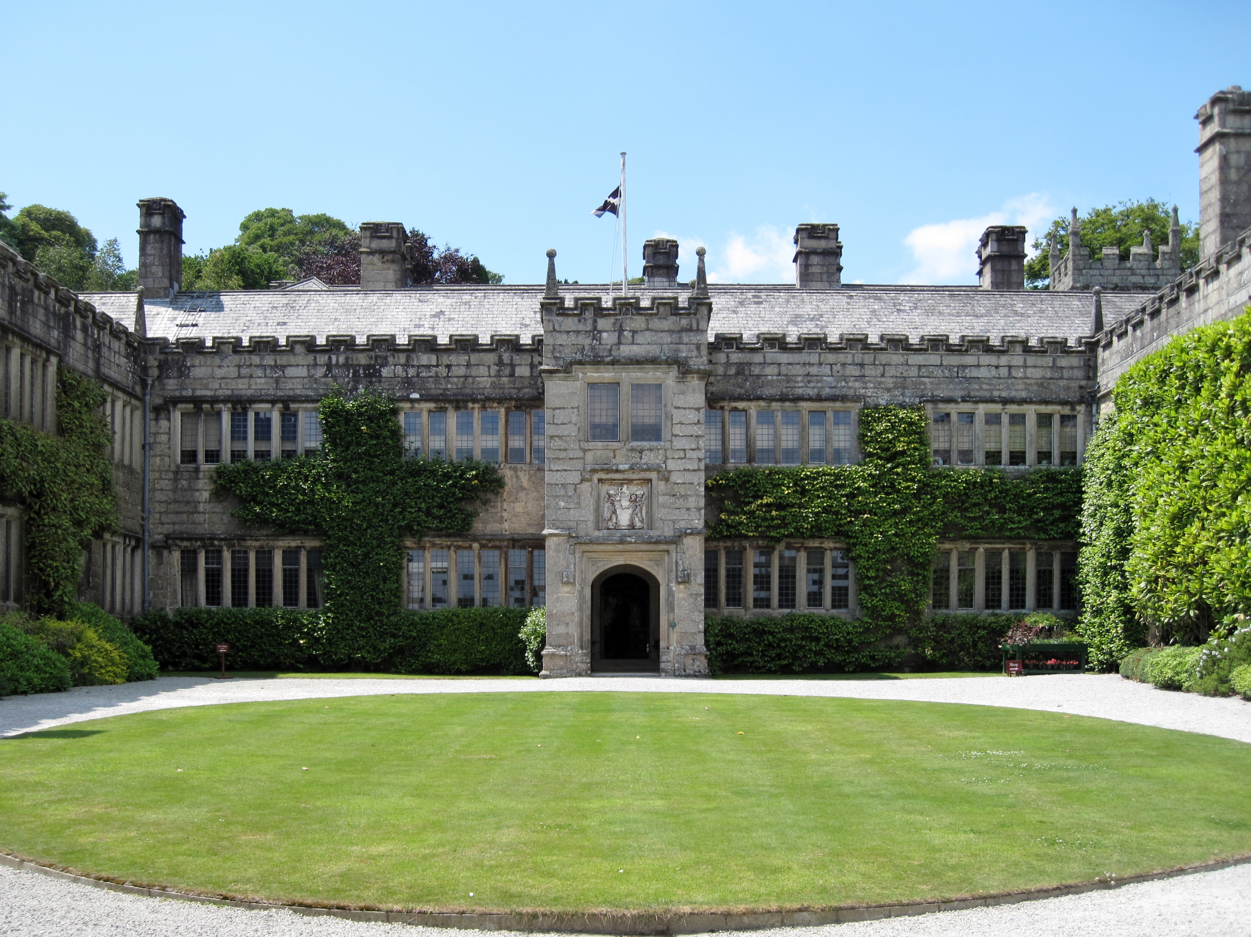 Lanhydrock, Herrenhaus nahe Bodmin in Cornwall, England